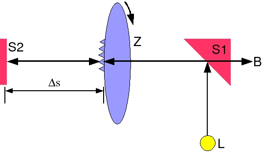 Versuchsaufbau der Lichtgeschwindigkeitsbestimmung nach der Methode von Fizeau